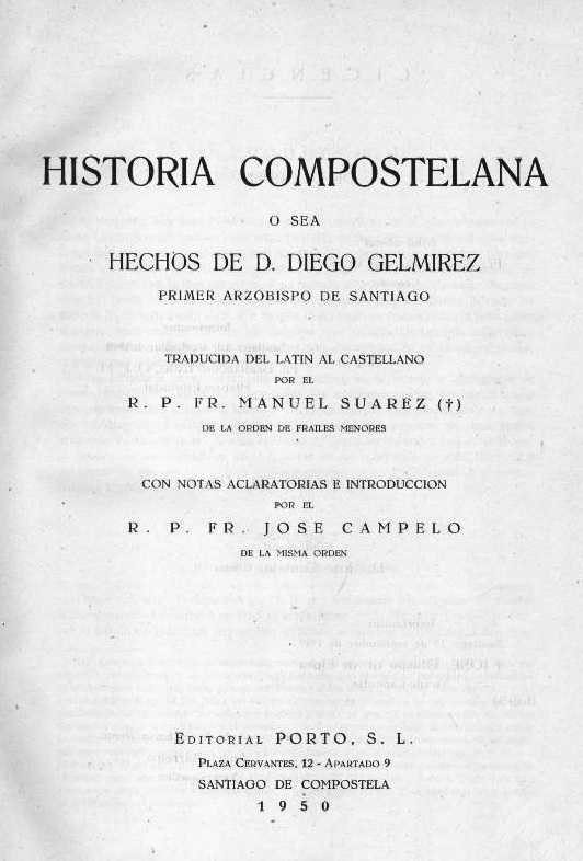 HISTORIA COMPOSTELANAo seaHECHOS DE D. DIEGO GELMÍREZprimer arzobispo de SantiagoTraducida del latín al castellanopor el R. P. Fr. Manuel Suárez (†)de la Orden de los Frailes Menorescon notas aclaratorias e introducciónpor elR. P. Fr. José Campelode la misma ordenEditorial PORTO, S. L.Plaza de Cervantes 12 - Apartado 9Santiago de Compostela1 9 5 0